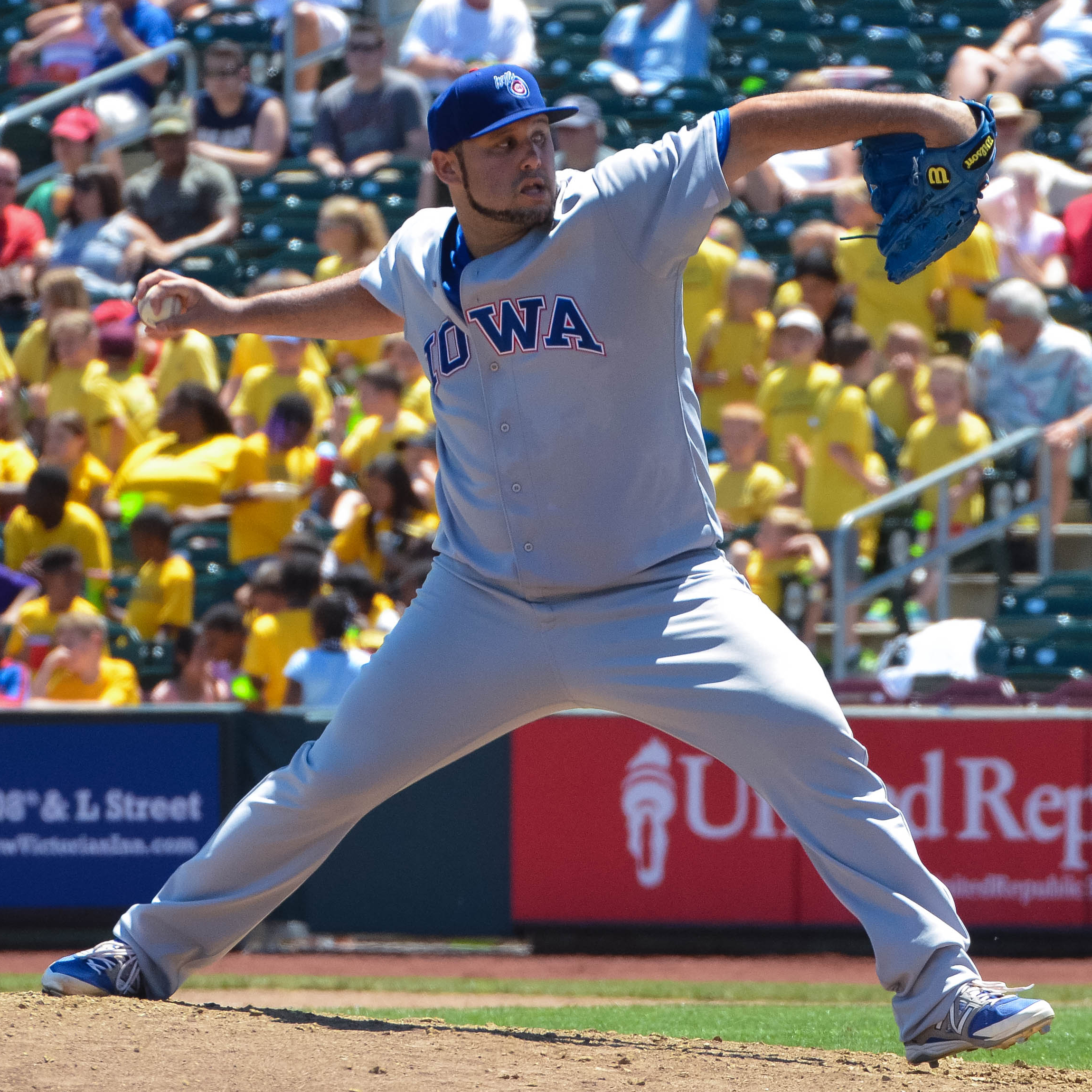 Felipe Paulino